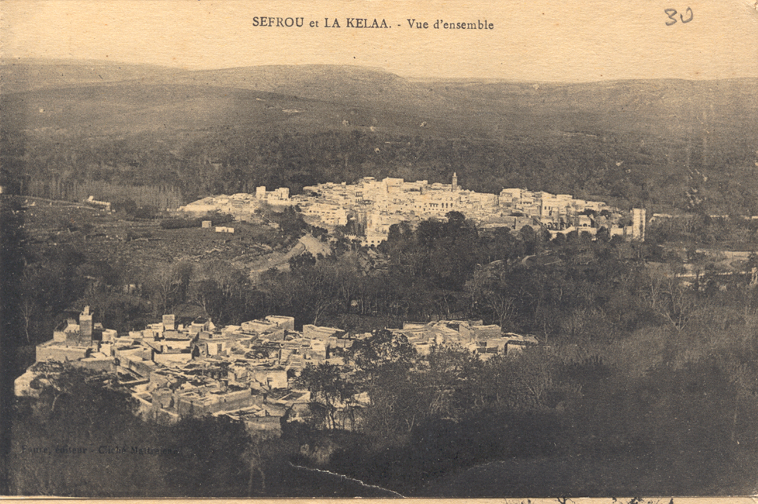 صفرو في بداية القرن العشرين وتتكون من نواتين: المدينة والقلعة يحيط بهما مجال اخضر